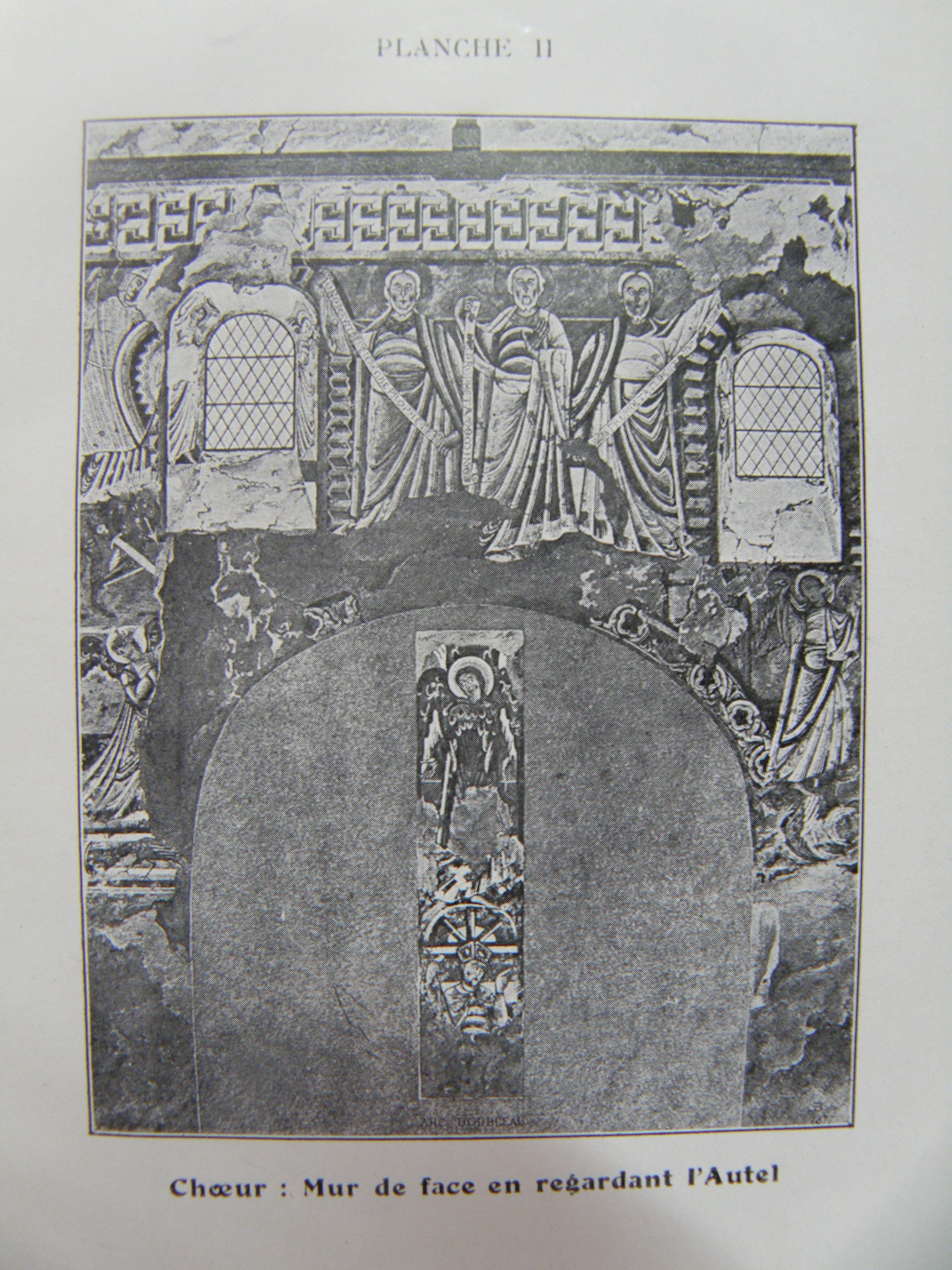 Relevé des fresques du mur sud de Vic, d'après Emmanuel Brune